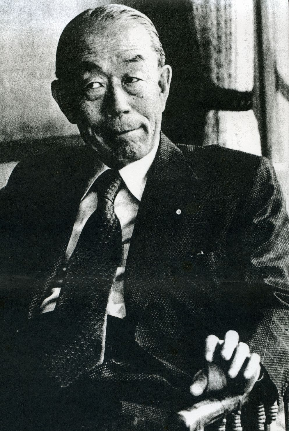 この写真は、福田赳夫（1905-1995）の肖像写真です。